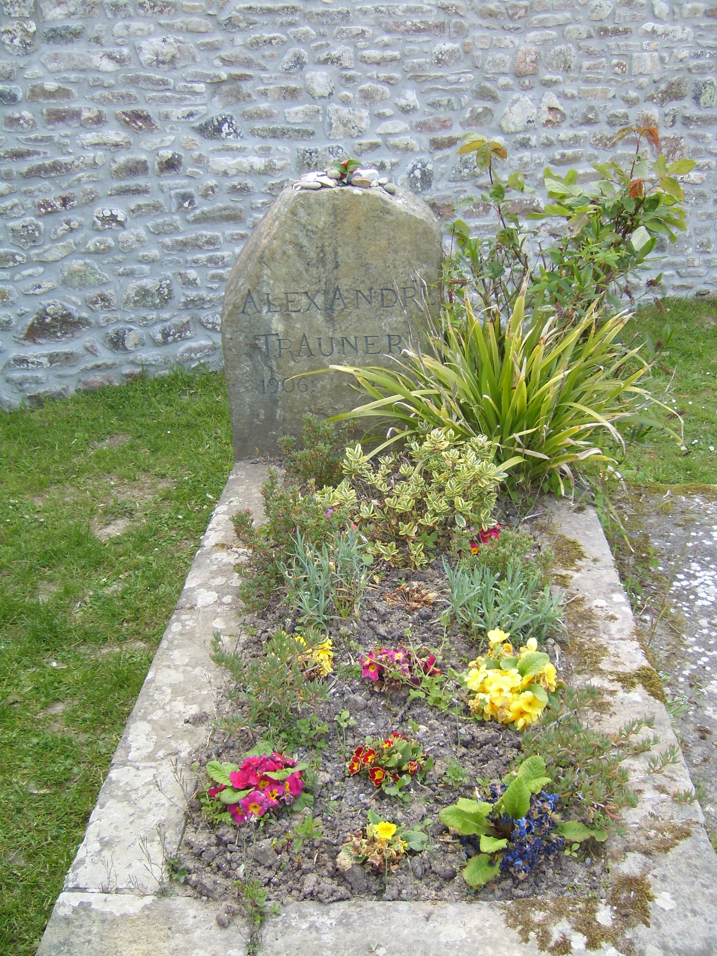 Omonville-la-Petite - Tombe d'Alexandre Trauner